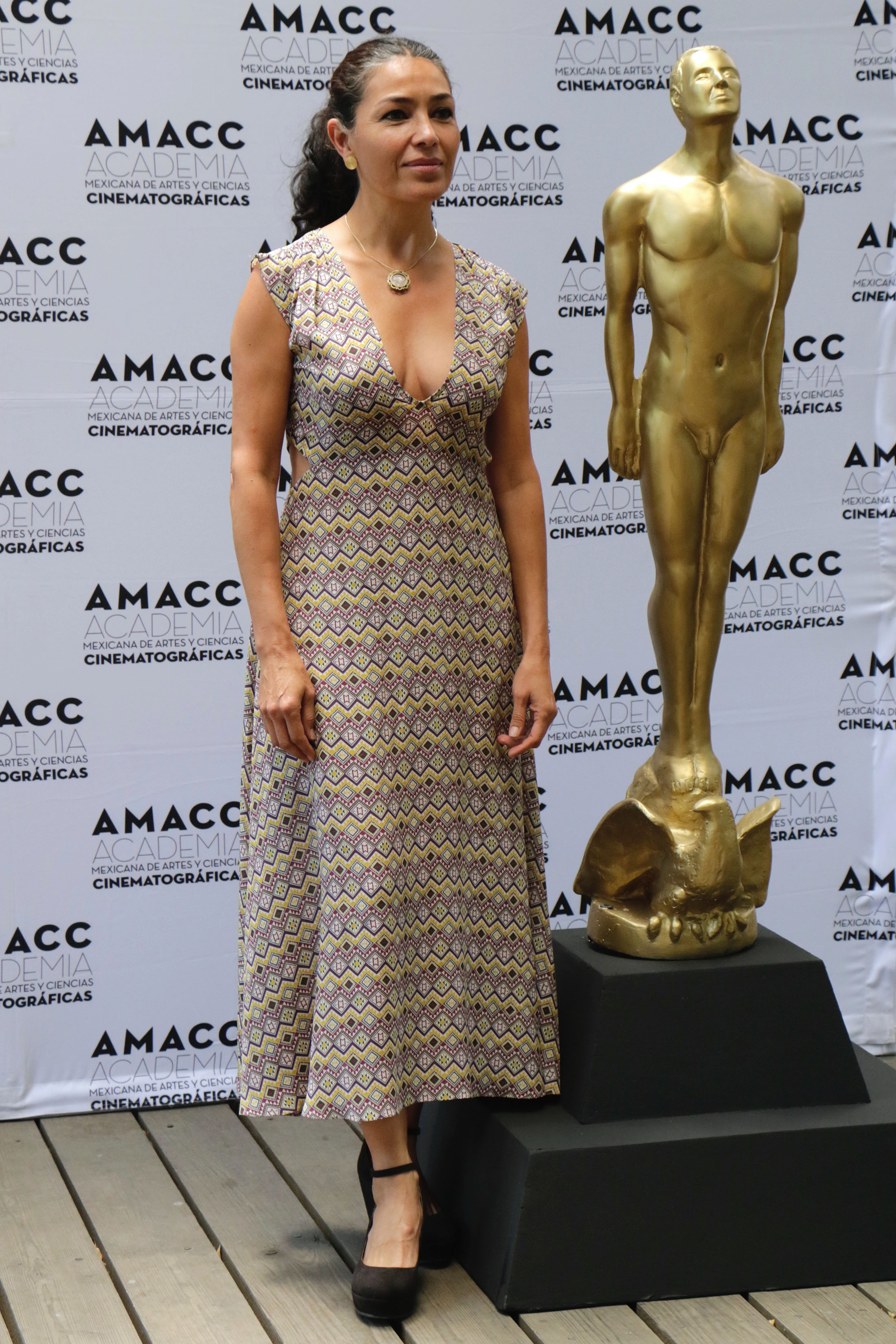 Lunes 22 de mayo de 2017. En la Galería Abierta de las Rejas de Chapultepec, se inauguró la exposición fotográfica La luz del Ariel: Cinefotógrafos ganadores. Dicha exposición muestra fotos de destacados fotógrafos del cine mexicano, ganadores el Ariel. Organizada por Secretaría de Cultura de la Ciudad de México, la Academia Mexicana de Artes y Ciencias Cinematográficas y el Fondo Mixto de Promoción Turística, atrajo personajes el mundo del cine. El acto protocolario estuvo encabezado por Eduardo Vázquez Martín, secretario de Cultura de la CDMX; Dolores Heredia, presidenta de la Academia Mexicana de Artes y Ciencias Cinematográficas; Jorge Sánchez Sosa, director genera de IMCINE; Gabriela López, coordinadora de Patrimonio Histórico, Artístico y Cultural de la SCCDMX; Juan José Saravia, coordinador de la exposición y Elisa Lozano, curadora de la exposición. Fotografía: Tania Victoria / Secretaría de Cultura de la CDMX.